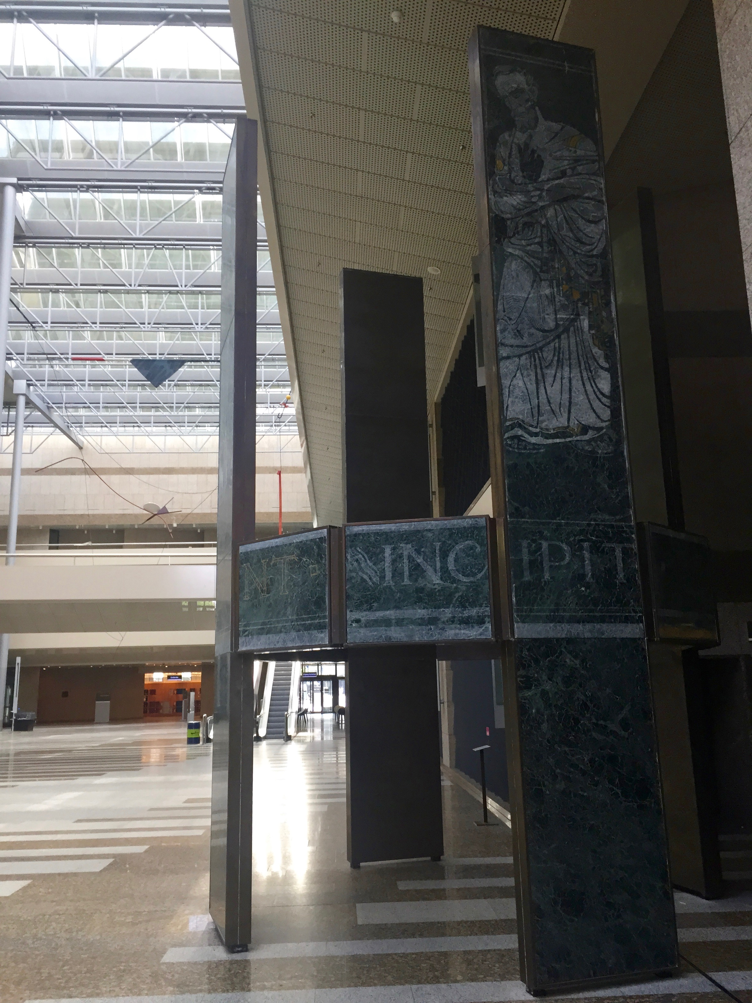 Kunstwerk Lex Wechgelaar van panelen ontworpen door Richard Roland Holst uit het gebouw van de Hoge Raad. Afgebeeld zijn Mozes, Solon, Justinianus en Napoleon met de spreuk 'Waar het recht ophoudt begint de oorlog'.